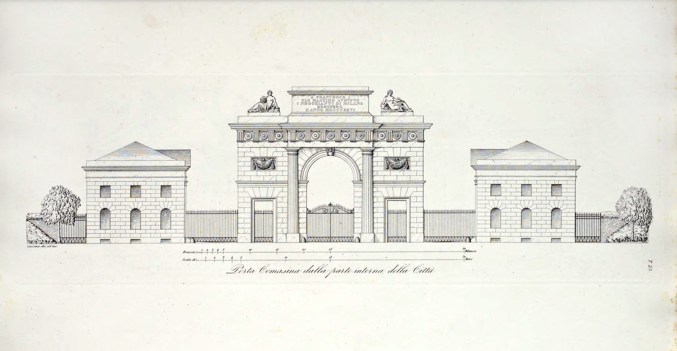 Ferdinando Cassina, Porta comasina dalla parte interna della città (1840), in Le fabbriche più cospicue di Milano, 1840.